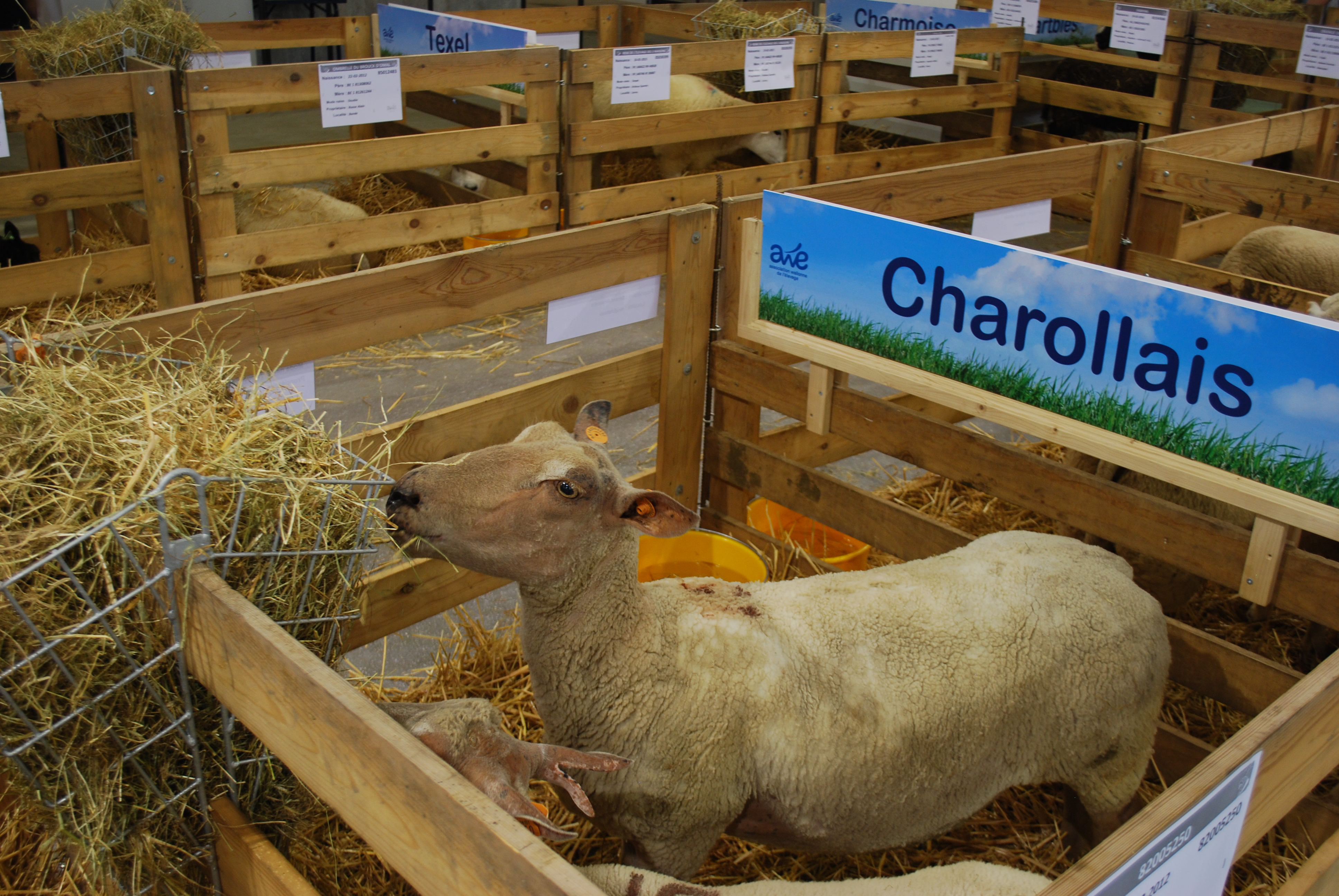 Vue de la Foire agricole de Libramont, dans le Luxembourg belge (82e édition en 2016).